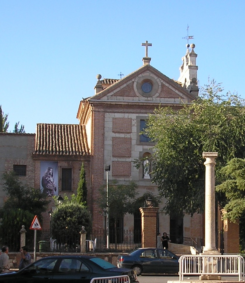 Taken by Valdoria. sept. 2006